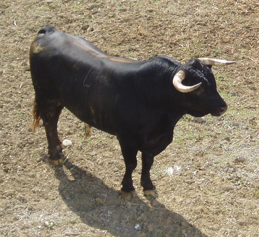 Toro de la ganadería Miura en los corrales de la plaza de toros de Estepona, Málaga.